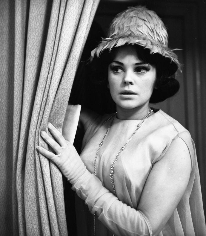 Zentralbild/Brüggemann 30.3.1962 [Herausgabedatum] Doris Abesser UBz: Fünf Minuten vor dem Auftritt.